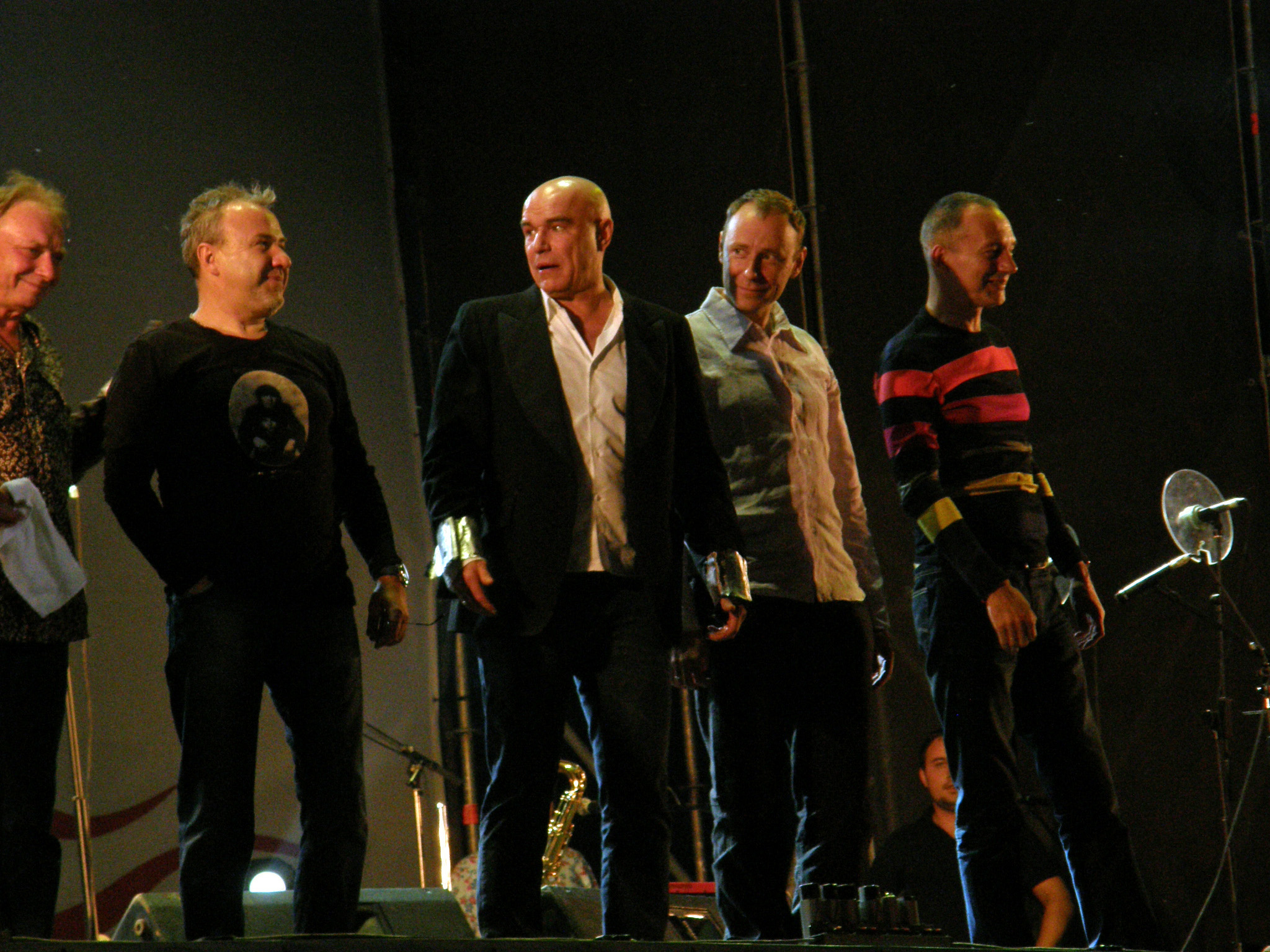 Концерт в парке Щербакова (Донецк) 6 июня 2010 года. Выступление группы «Моральный кодекс».